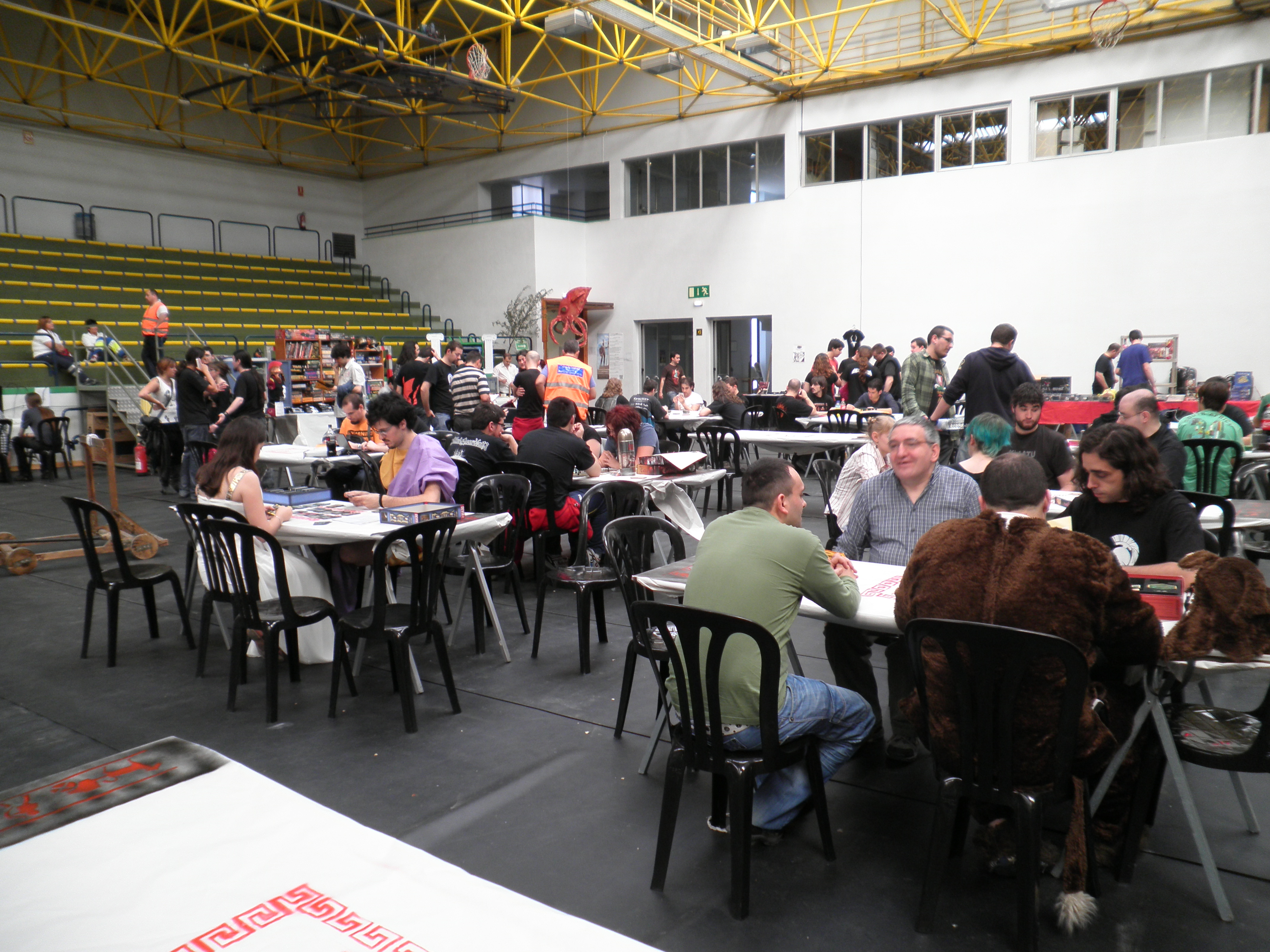 Topaketa errunikoak 2011, Orereta.